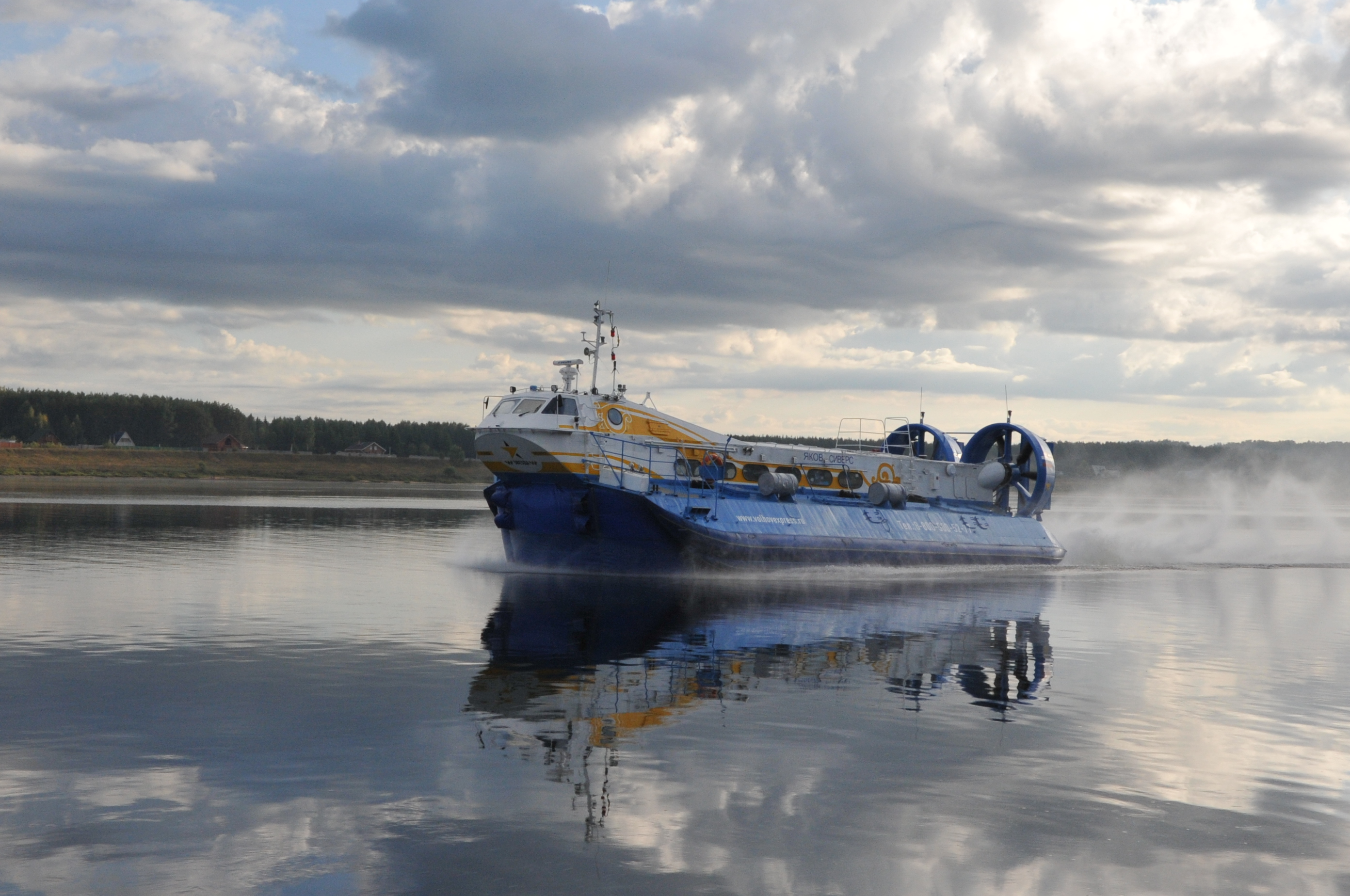 СВП А48 вечером